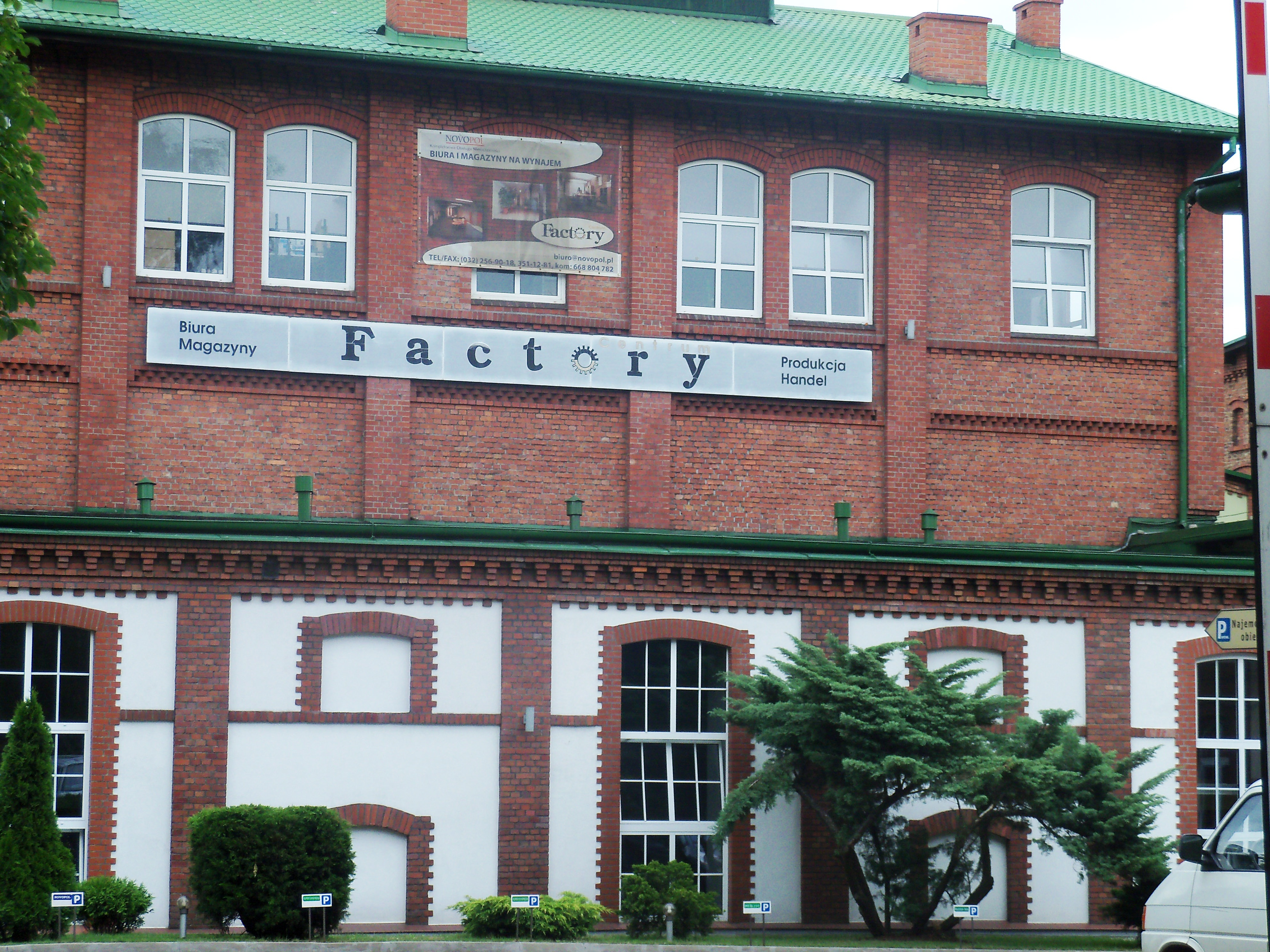 Katowice-Szopienice: ulica ks. bpa Herberta Bednorza - jeden z budynków dawnego browaru braci Mokrskich